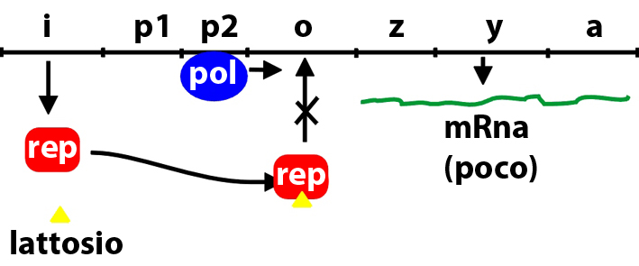 Immagine di Danilo Giacomelli